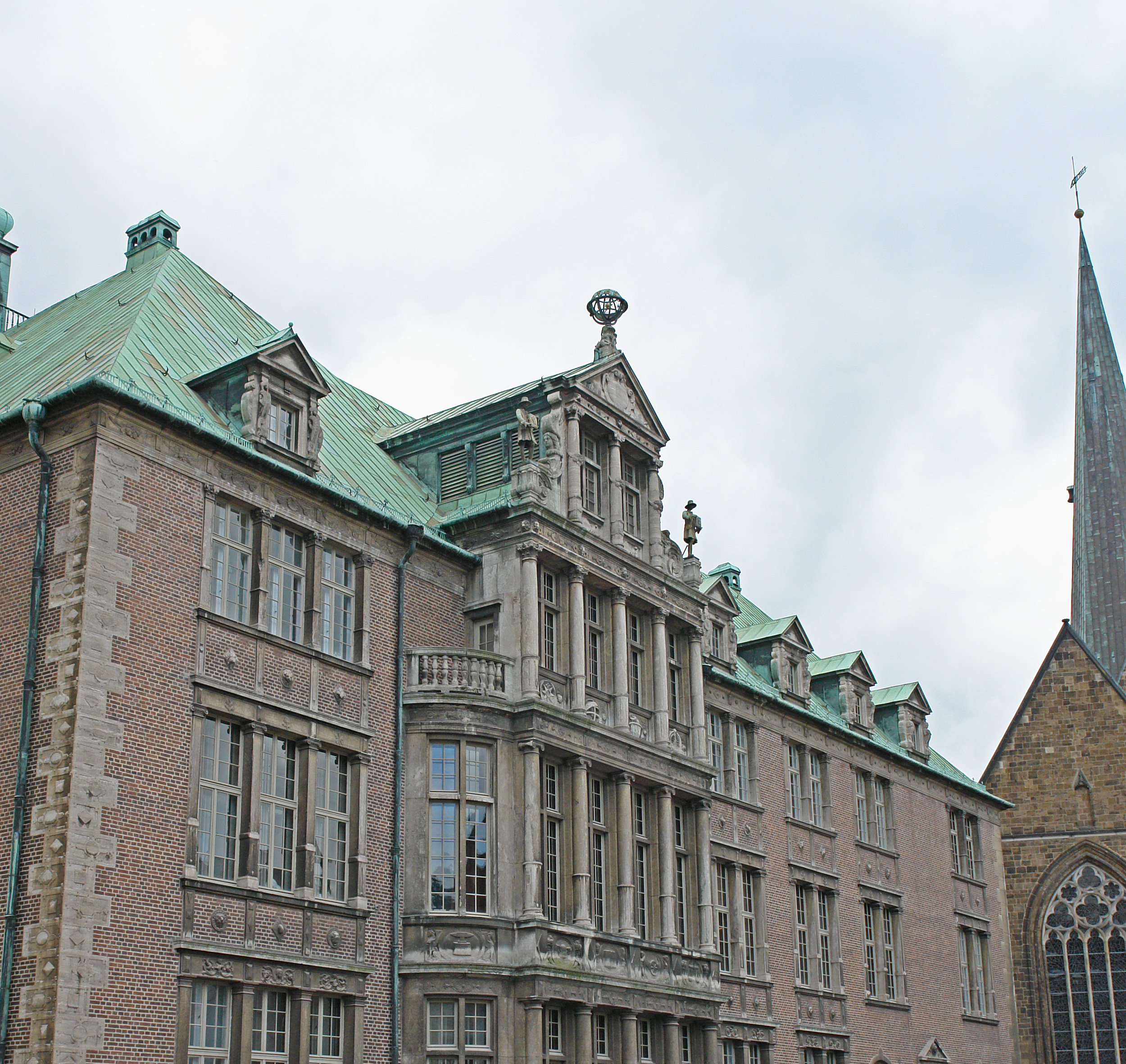 Neues Rathaus in Bremen, Domshof-FassadeDas abgebildete Objekt ist ein geschütztes Kulturdenkmal in der Freien Hansestadt Bremen, mit der Nr. 0066,T003 beim Landesamt für Denkmalpflege registriert.